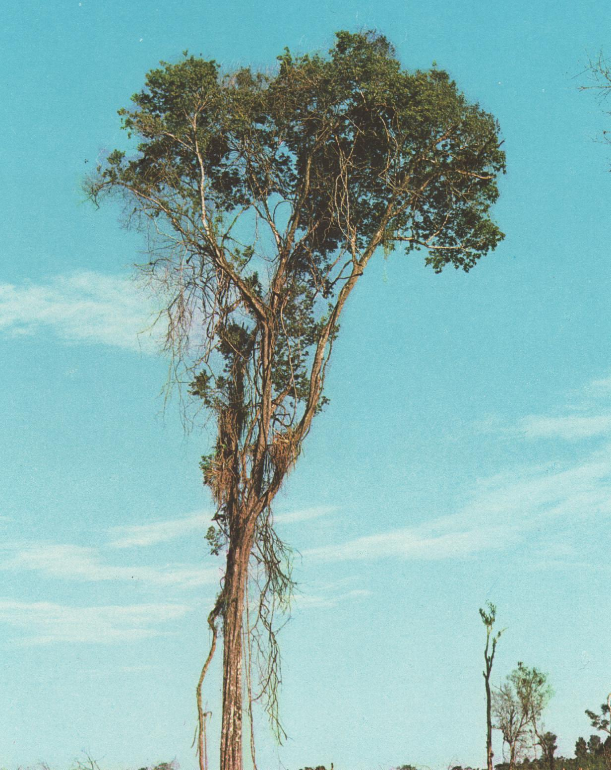 Ejemplar de Diatenopteryx sorbifolia en Misiones, Argentina.